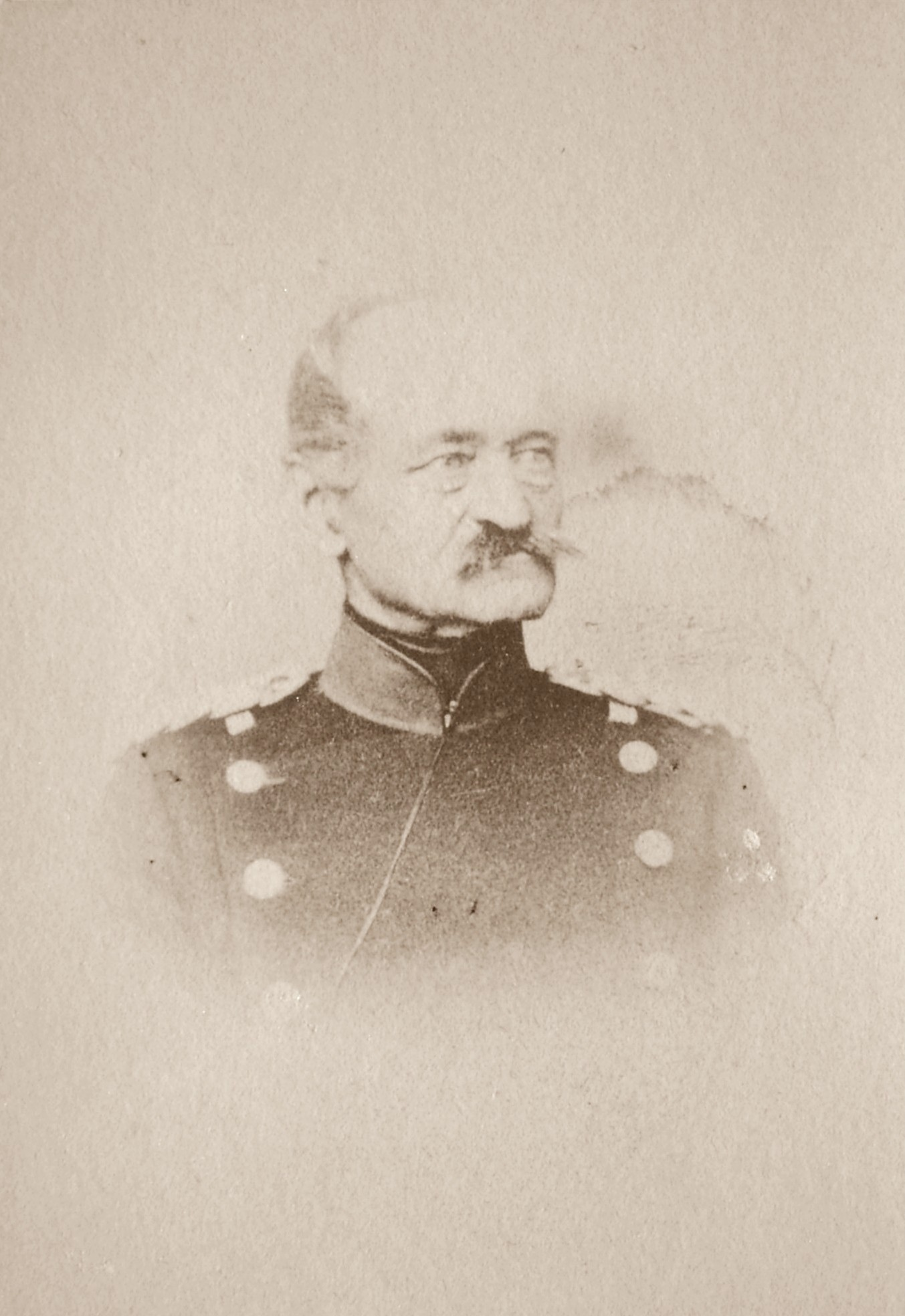 General Karl Joseph Maria Freiherr von Horn (1818-1896)